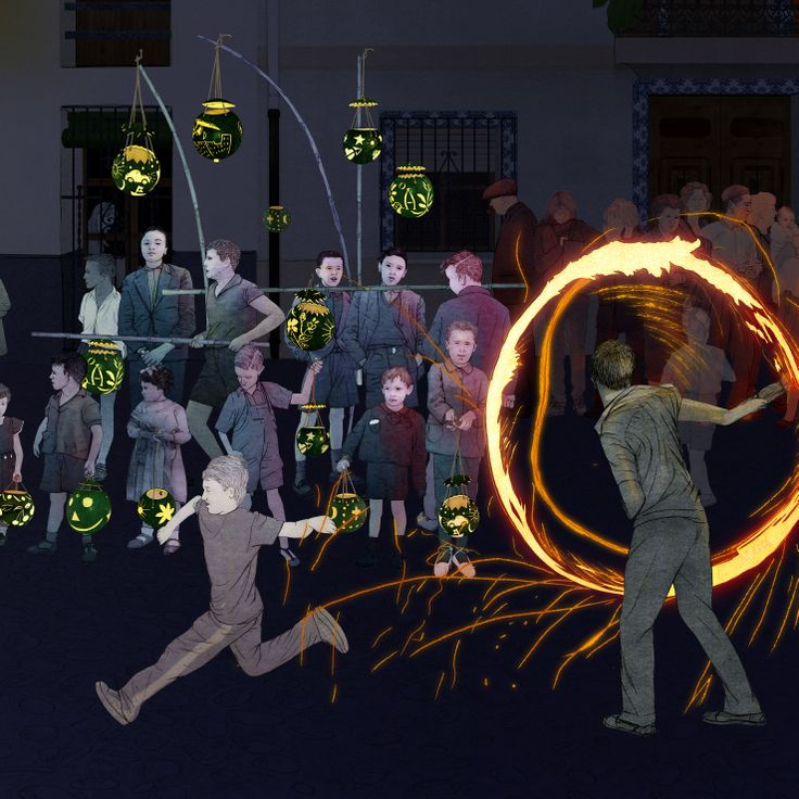 Il·lustració del Museu Valencià d'Etnologia per al Museu Comarcal de la Vall d'Albaida (Benissoda). This is a photography of a Folklore festival in Spain (Wikidata id Q23663386).